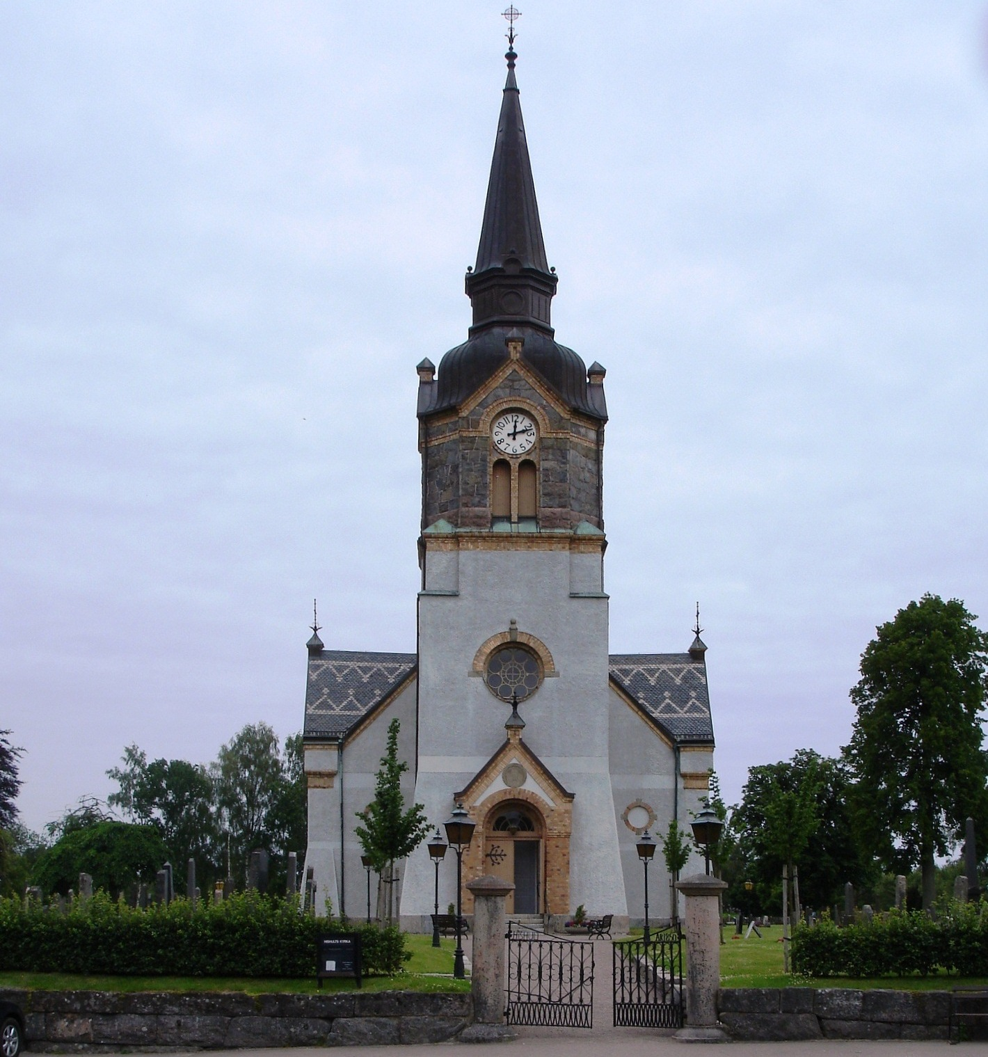 Hishults kyrka i sydöstra Halland i Laholms kommun